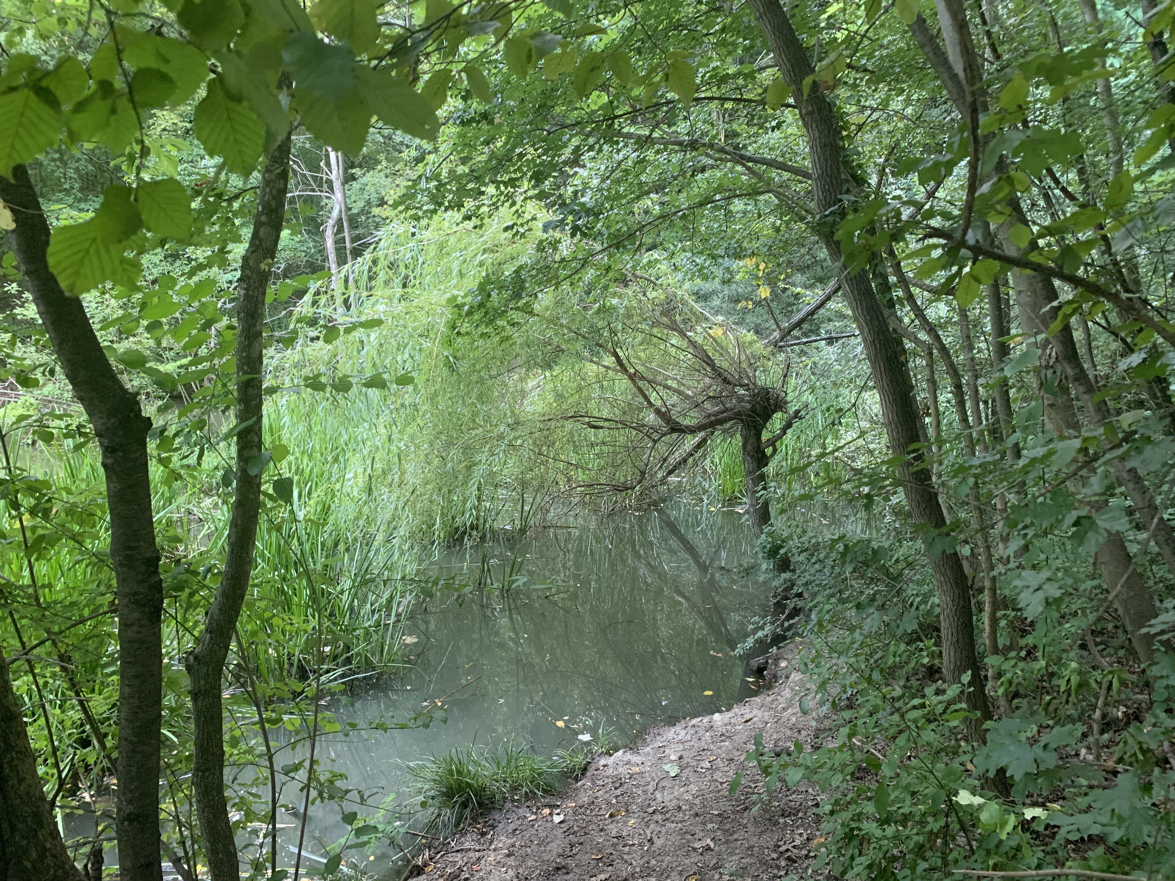 Minichlacke, Teich im Maurer Wald, Liesing